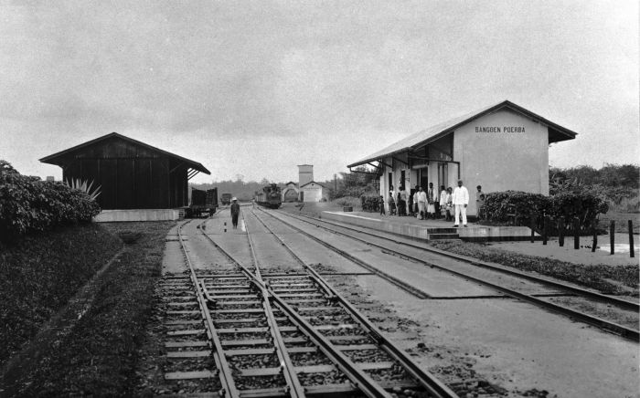 Foto. Het station van Bangoen Poerba, langs de Deli-spoorlijn, oostkust Sumatra